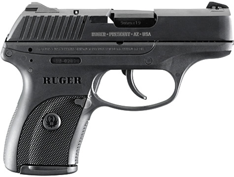 Ruger LC9 Semi-automatic pistol